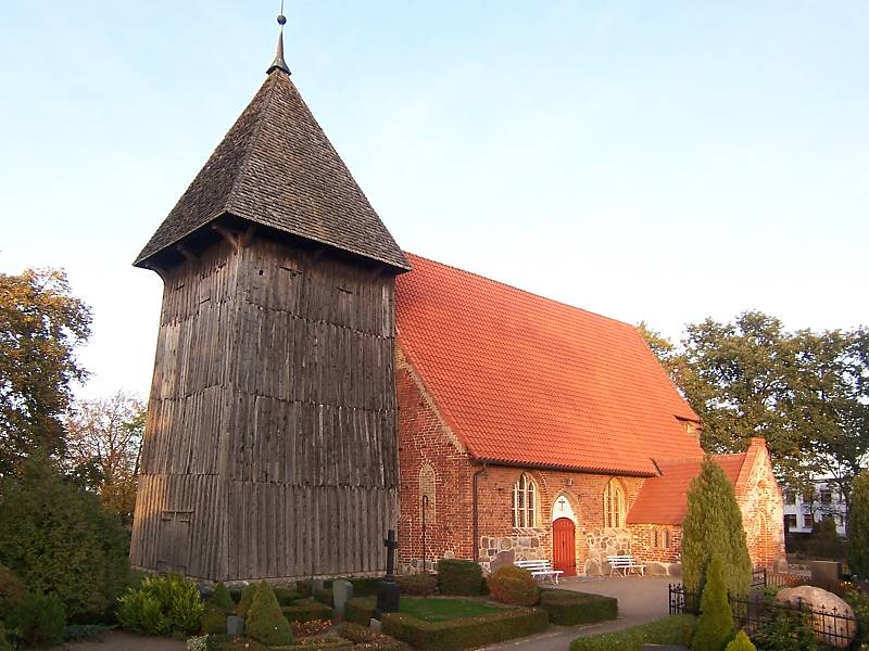 Kirche in Rethwisch, Mecklenburg-Vorpommern